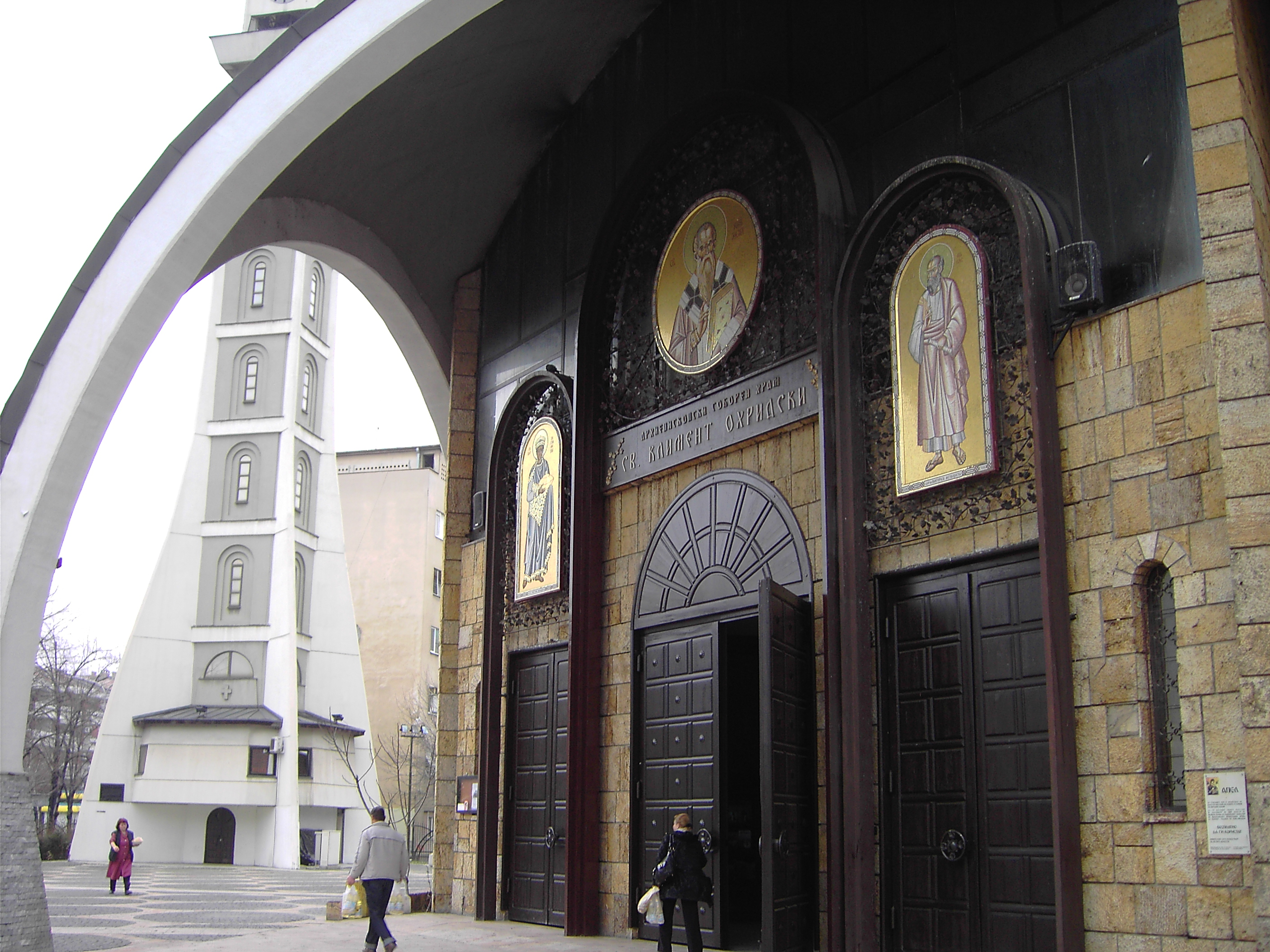 Соборната црква во Скопје